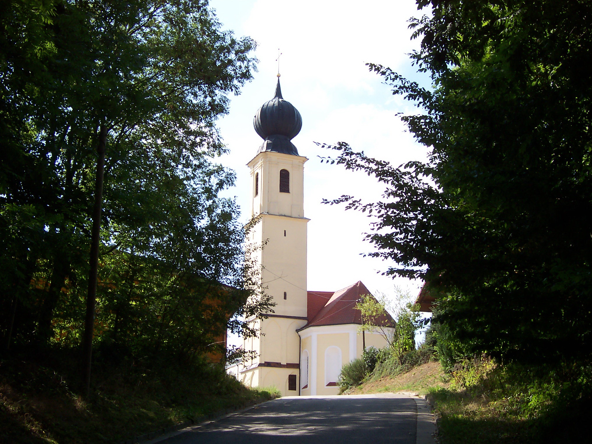 Essenbach, Mettenbach, Veitsberg. Katholische Nebenkirche St. Vitus, barocker Bau des späten 17.Jahrhundert, Turmuntergeschoß noch spätgotisch; mit Ausstattung.